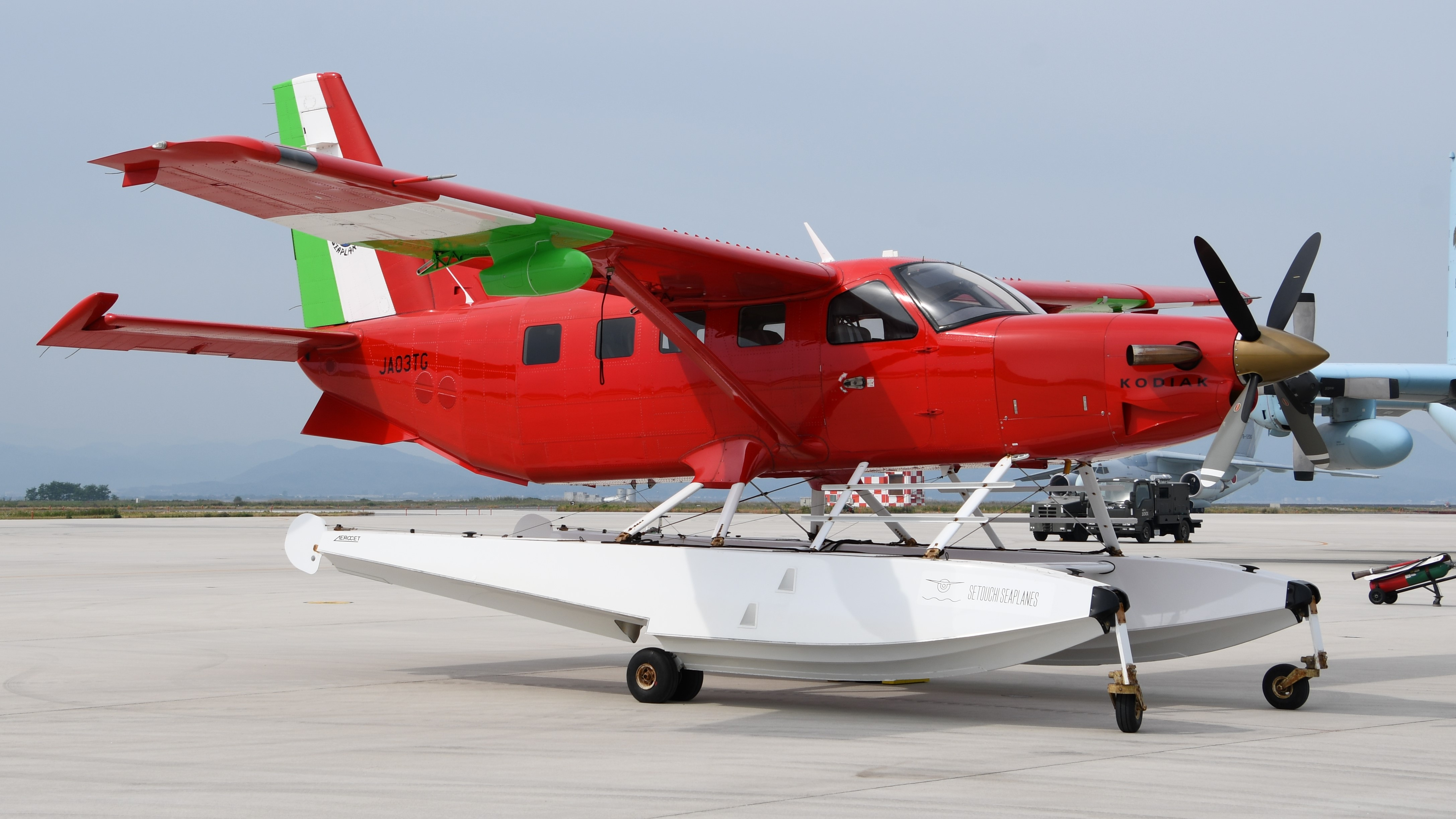 せとうちSEAPLANES クエスト・コディアック100水陸両用機（JA03TG、”ラーラ ロッサ”） 右前面。2019年6月2日 航空自衛隊美保基地にて。